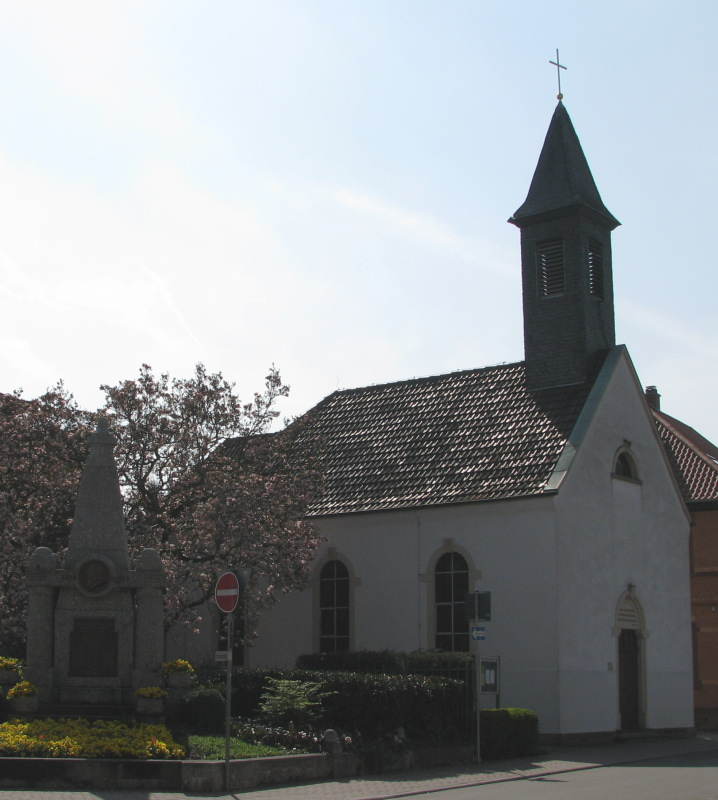 Evangelische Kirche in Brühl